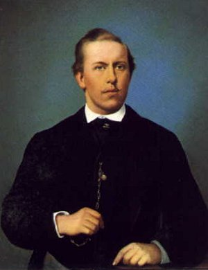 REI D. LUIS